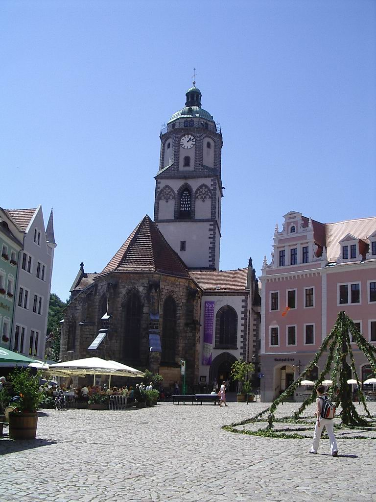 Meißen - Marktplaz with Rathaus and Frauenkirche